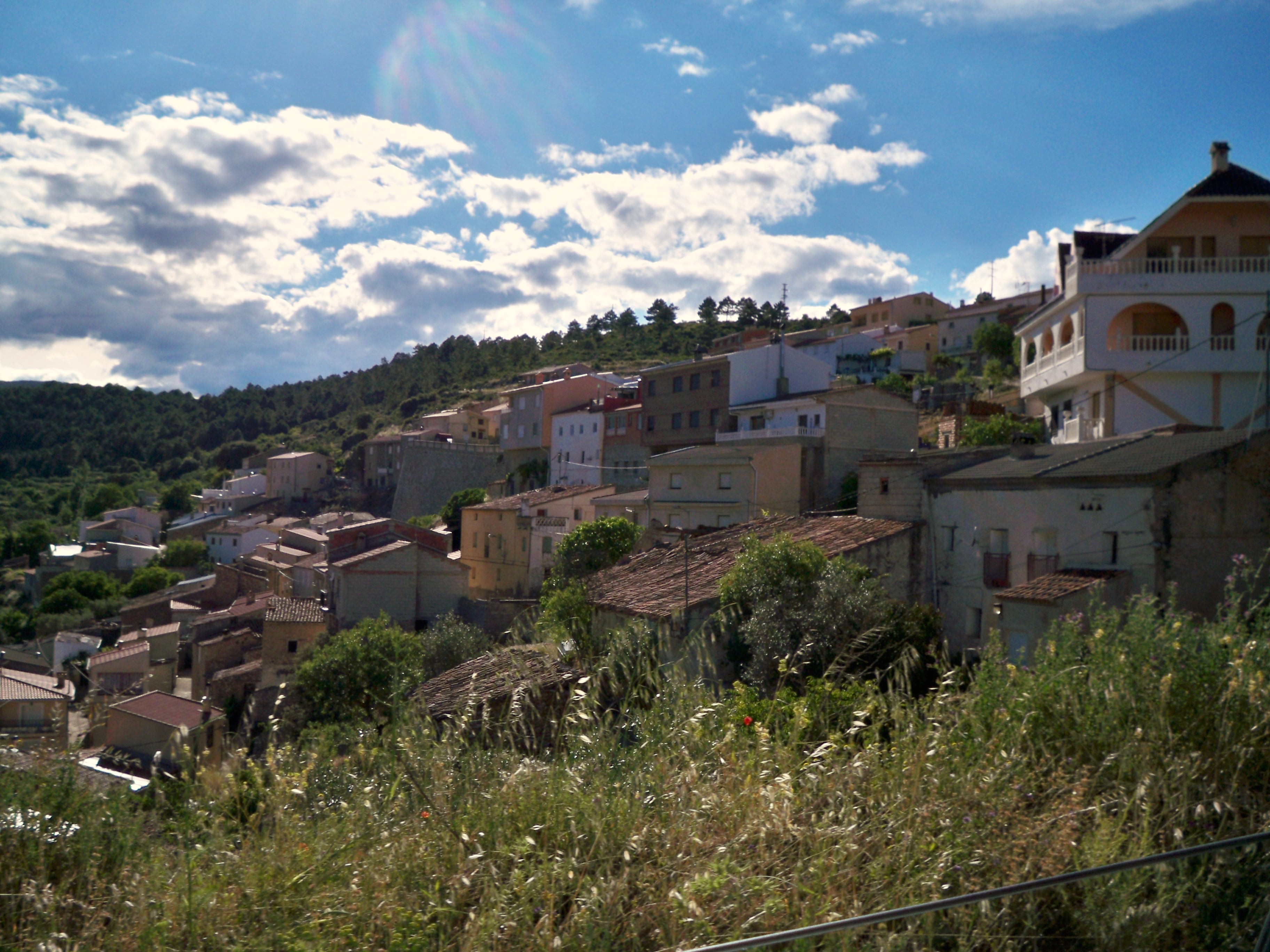 Vista de la localidad de El Pardal (Molinicos - Albacete)